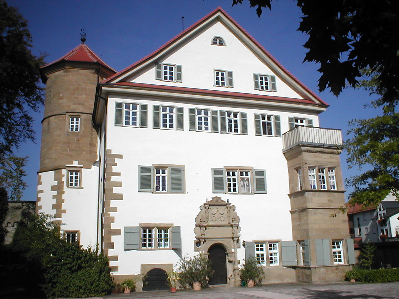 Gemminger Schloss ("Unterschloss") in Gemmingen, erbaut 1592, mit schmuckvollem Renaissance-Portal